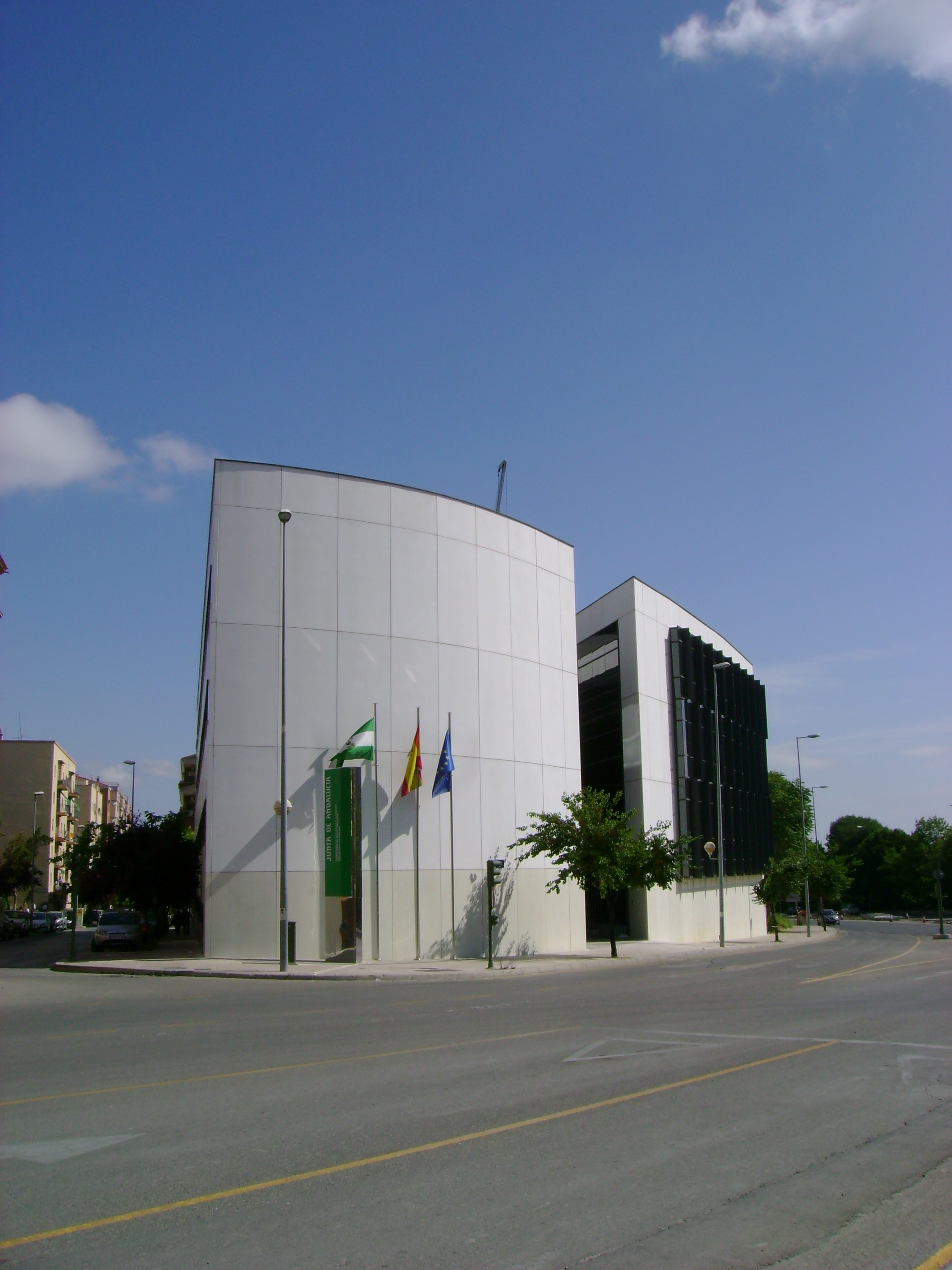 Edificio administrativo de la Junta de Andalucía en el cruce de la Carretera de Madrid con la Avenida de Madrid en Jaén. Alberga las Consejerías de Medio Ambiente y de Innovación y Ciencia. Foto hecha desde el Monumento a los Donantes de Jaén antes de las obras del tranvía.